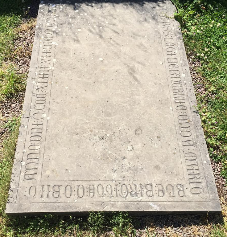 Replica av gravhällen